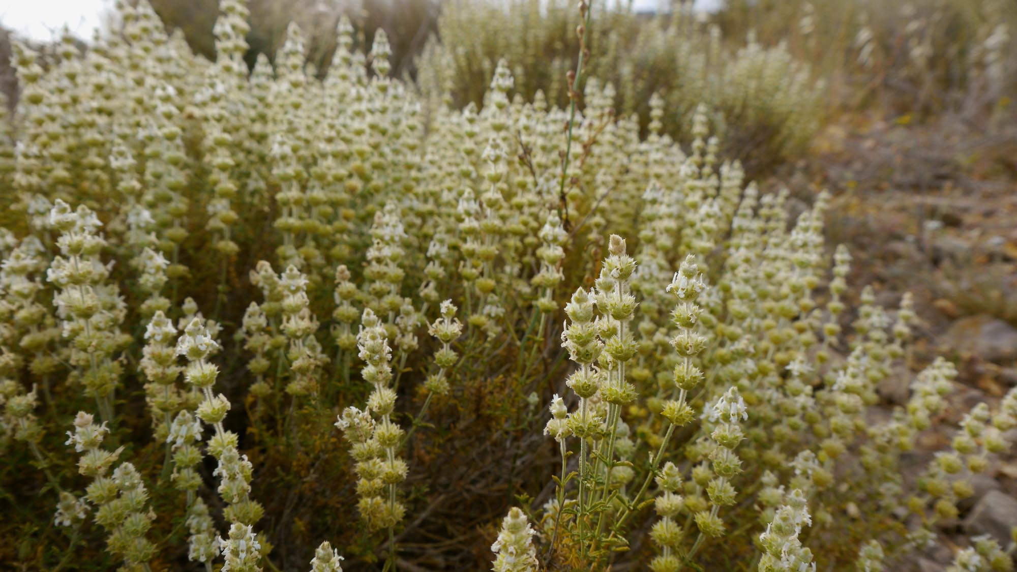 Sideritis pusilla en El Carmolí, Cartagena (España)